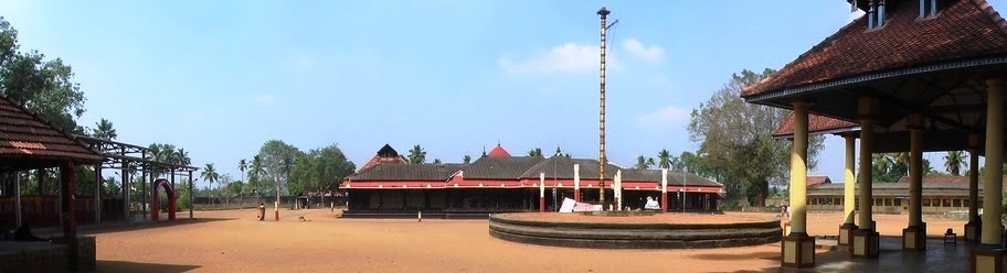 ചെങ്ങന്നൂർക്ഷേത്രം